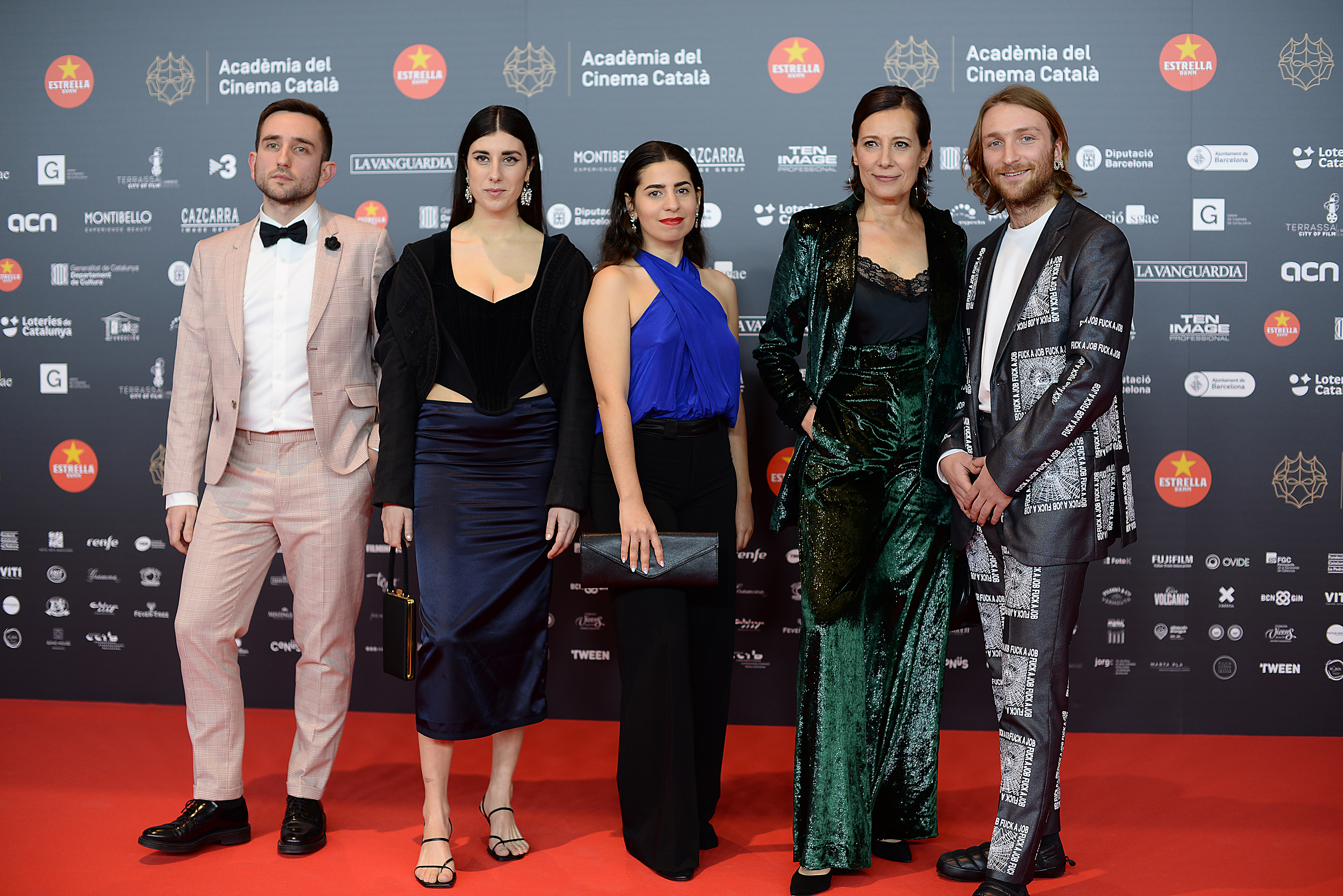 Gerard Marginedas, productor; Elena Martín, actriu; Irene Moray, directora; Míriam Porté, productora executiva, i Max Grosse, actor (Suc de síndria), XII Premis Gaudí (2020)